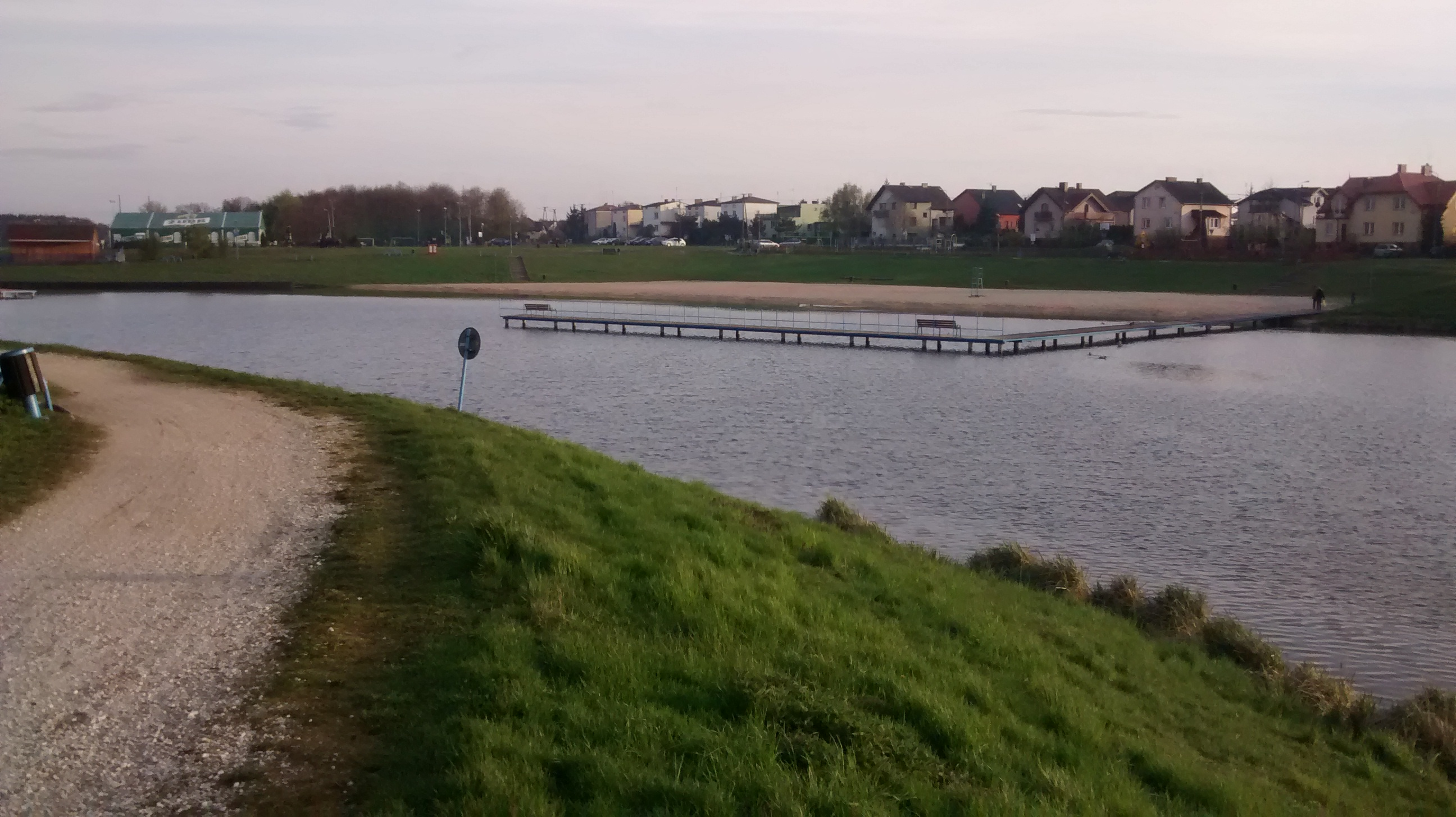 Zalew od strony wschodniej